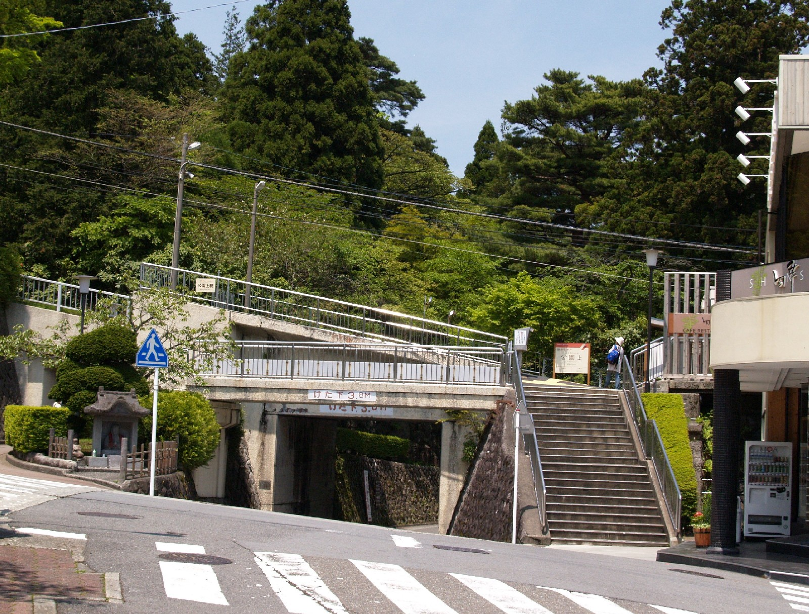 公園上駅入口